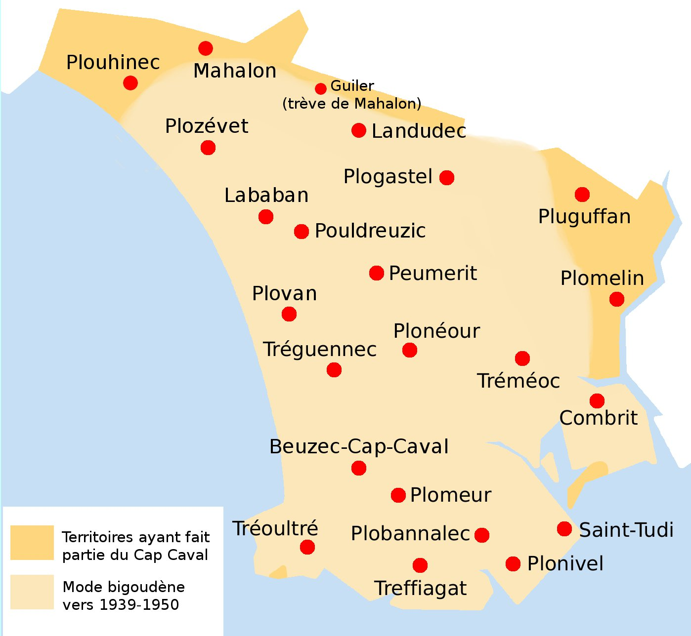 Pour la limite nord du pays Bigouden, je me suis inspiré de cartes trouvées dans René-Yves Creston, Le Costume breton, Champion, 1993, cartes 34, 36 et 41 (la carte 41 est relative à l'année 1939) ; et dans Jakez Cornou, Pierre-Roland Giot, Origine et Histoire des Bigoudens, Le Guilvinec, Le Signor, 1977, p. 34 (« vers 1950 »). On retrouve à peu près le même tracé (mais en plus petit) dans Pierre-Jakez Hélias, Coiffes et costumes de Bretagne, Châteaulin, Le Doaré, 1996, p. 15 ; et dans Mikael Bodlore-Penlaez, Divi Kervella, Atlas de Bretagne, Coop Breizh, 2011, p. 68. Tous ces tracés concernent le costume, et peut-être pas le parler, la musique, les danses, etc. Je n’ai pas cherché à les reproduire fidèlement, puisqu’il s’agit de cultures qui s’interpénètrent, de frontières assez floues, évolutives… Il ne faut donc voir ici qu’un croquis grossier, n’ayant aucune prétention historique. Il ne vise qu’à montrer que le Cap Caval était plus vaste que le pays Bigouden. Il ne faut pas se fier non plus à ma frontière du Cap Caval, qui est toute symbolique : comme je doute qu’il existe une carte des paroisses de 1368, je me suis inspiré, sans aucune précision, des limites de paroisses figurant sur la carte « Les paroisses à la fin de l’Ancien Régime » d’Hervé Torchet, Réformer l'Ancien Régime au bout de la Bretagne, La Pérenne, 2005, t. I, p. 2. J'ai fait figurer 22 paroisses, celles que mentionne le compte de 1368 de l'archevêché de Tours. On en trouve la liste sur (Bodivit n'est pas citée : sans doute n'est-elle pas encore paroisse en 1368).